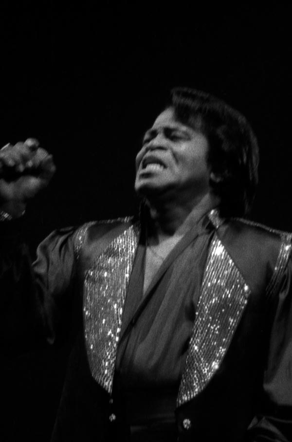 Џејмс Браун у Београду 1993., снимио Ранко Томић